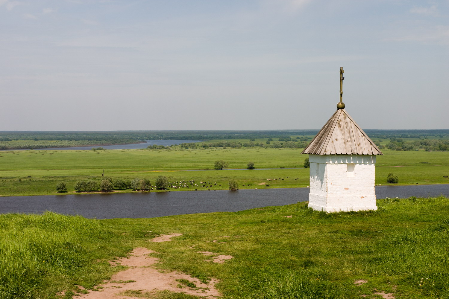 Konstantinovo, Ryazanskaya oblast